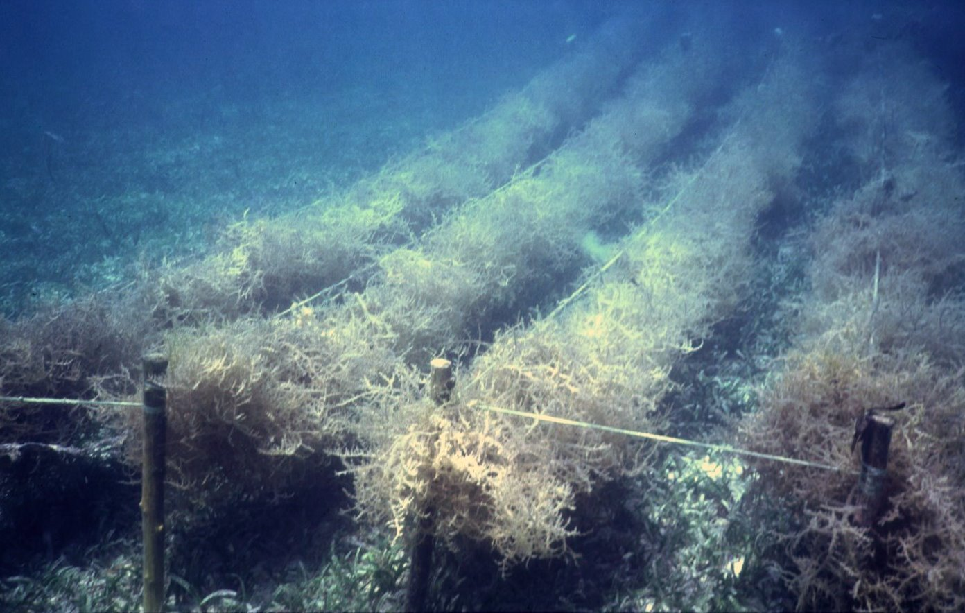 Eucheuma farming, Philippines